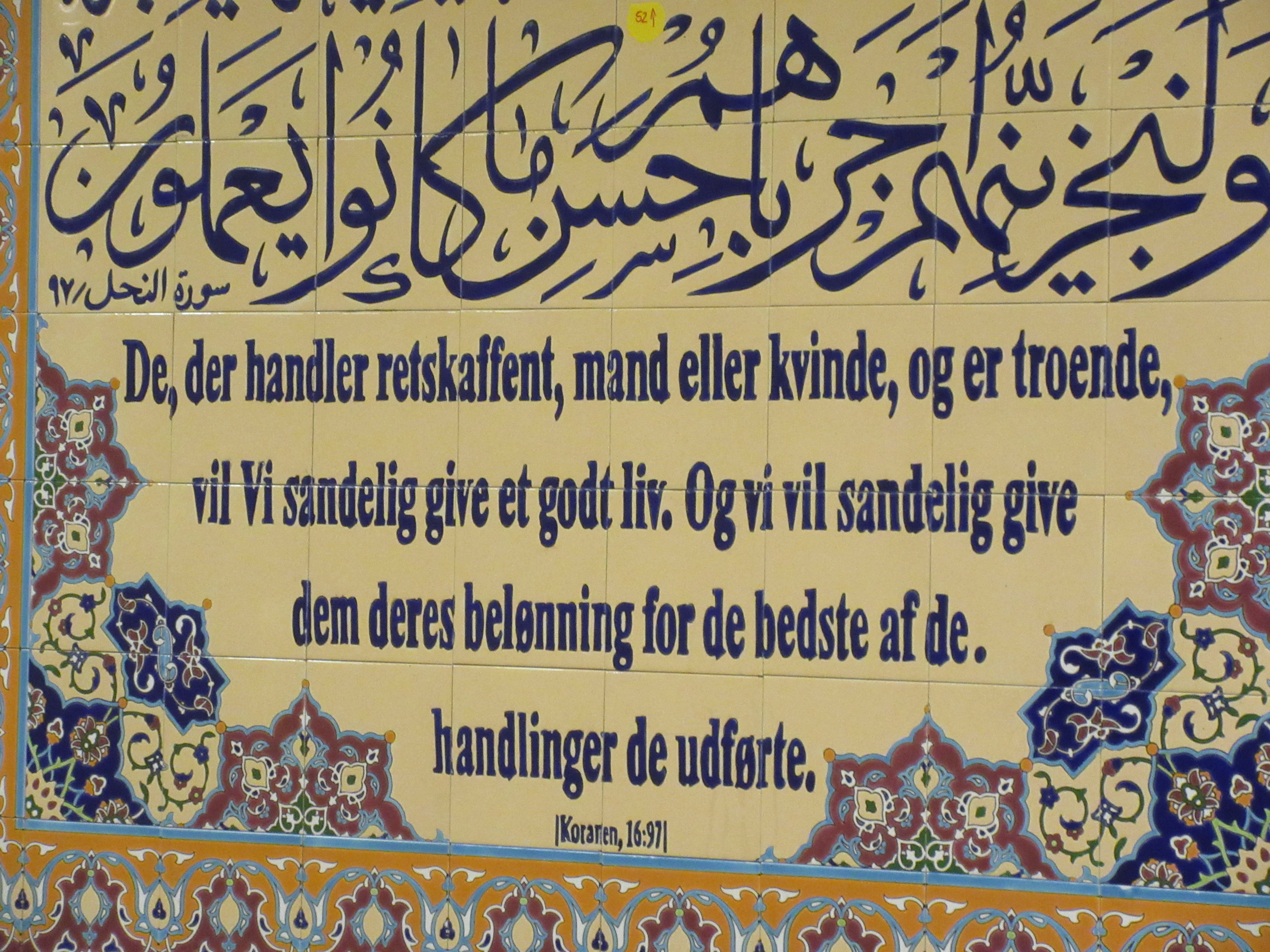 Et koranvers øverst på arabisk og nedenunder i dansk oversættelse. Fra vægfrise i Imam Ali-moskeen på ydre Nørrebro i København.